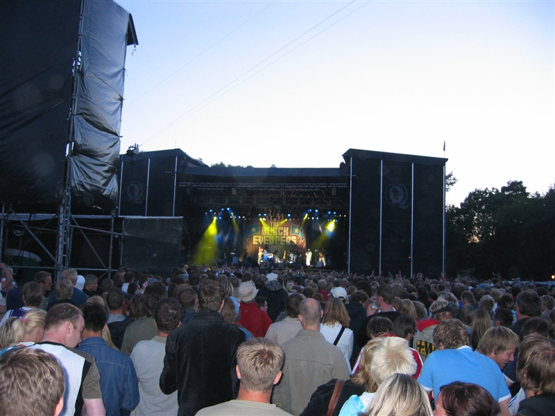 The Black Eyed Peas opptrer på Idrettsplassen under Quartfestivalen 2004.